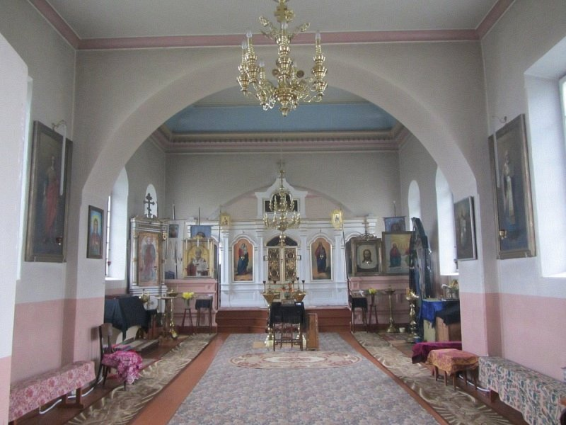 Пескі (Мастоўскі раён). Царква Святога Мікалая